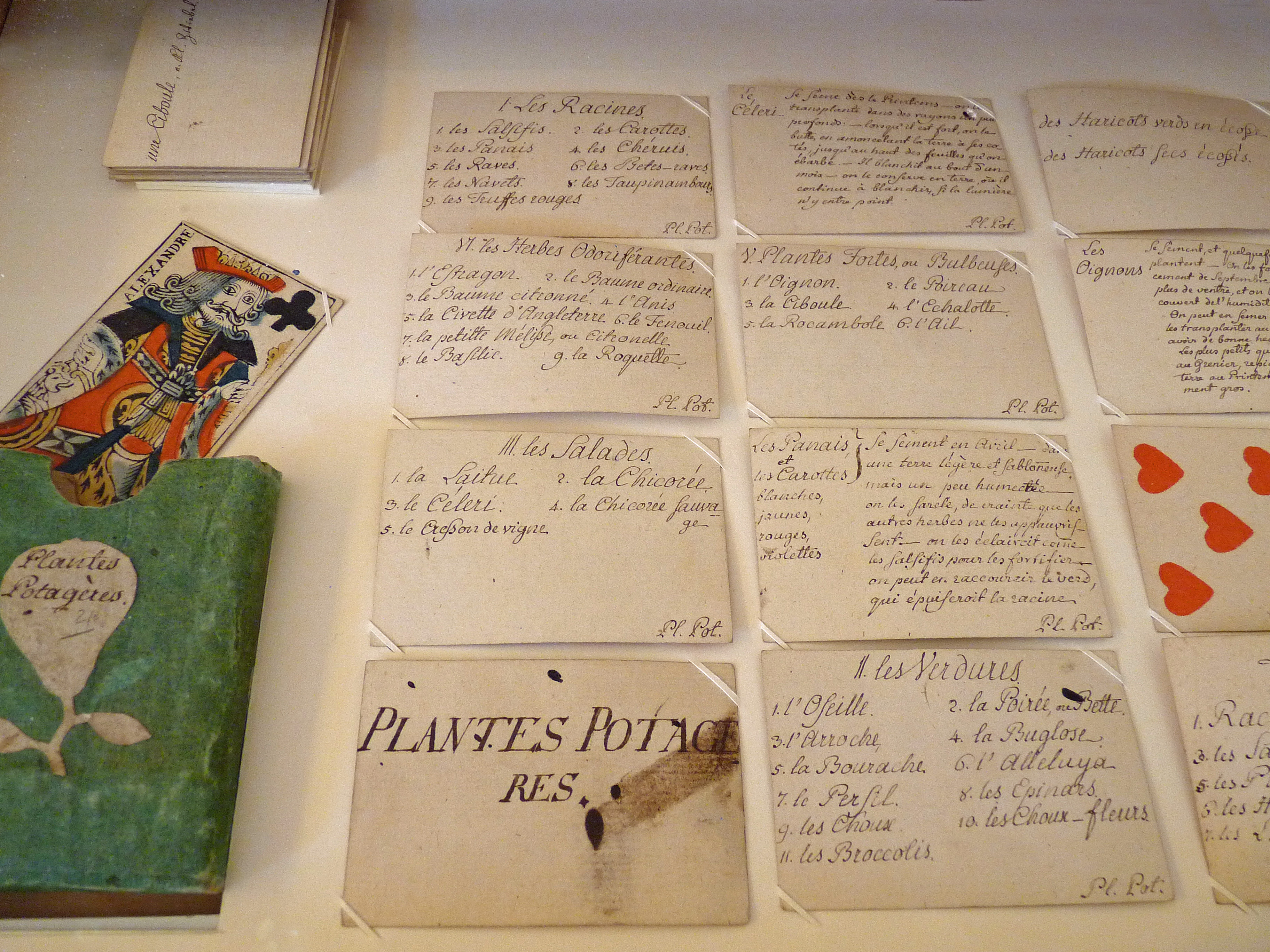 Fiches pédagogiques botaniques conçues par le pasteur Oberlin sous forme de cartes à jouer réunies dans des étuis. Ici les plantes potagères. Musée Jean-Frédéric Oberlin à Waldersbach (Bas-Rhin).